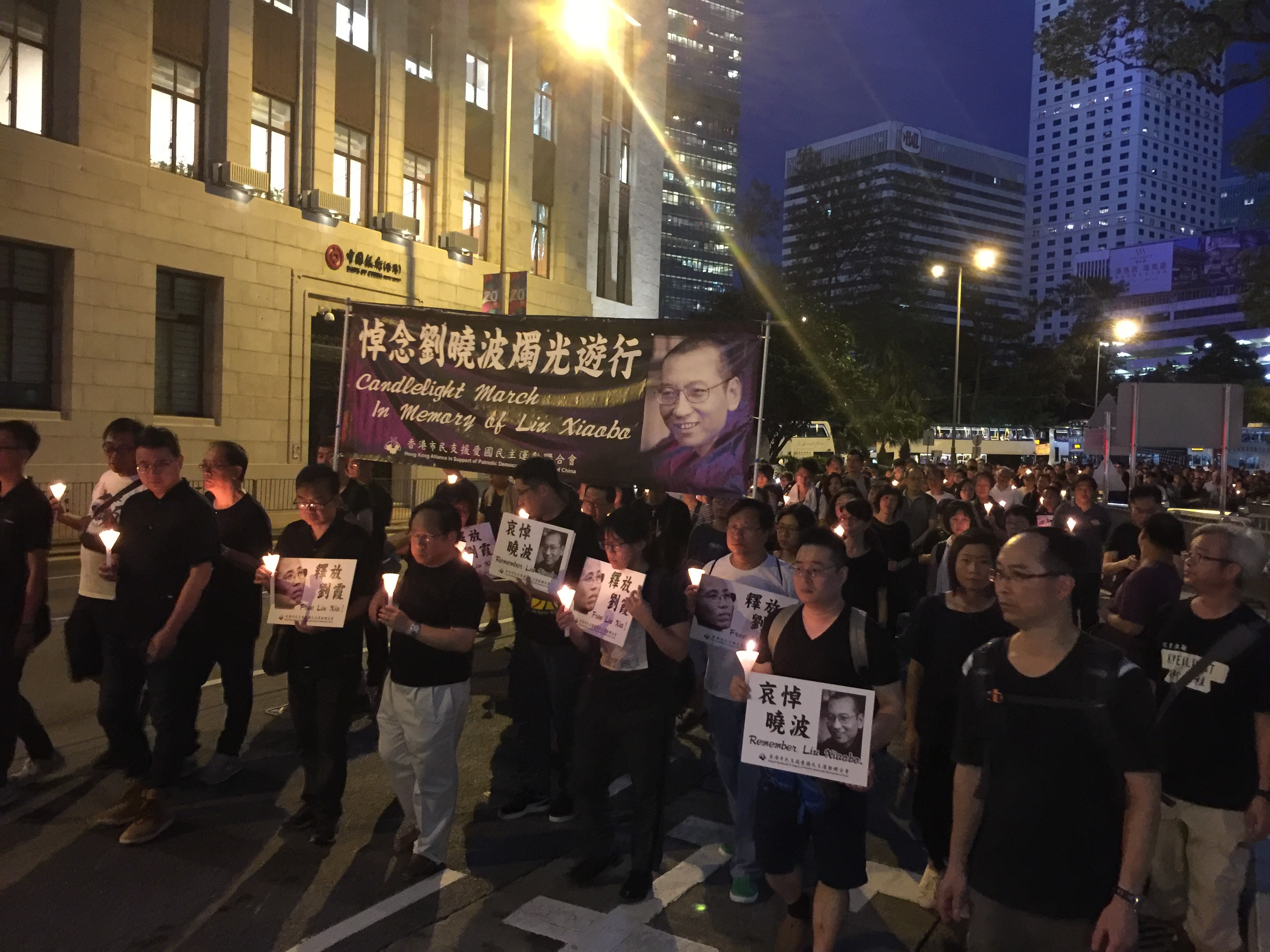 中文（台灣）: 連日來在北京駐港機構中聯辦前設祭壇供民眾獻花及弔唁中國諾貝爾和平獎得主劉曉波的支聯會，7月15日晚發起燭光遊行悼念週四病逝的劉曉波，並強烈要求中國當局讓劉曉波的妻子劉霞真正自由。 港人燭光遊行至中聯辦悼念劉曉波（美國之音海彥拍攝）